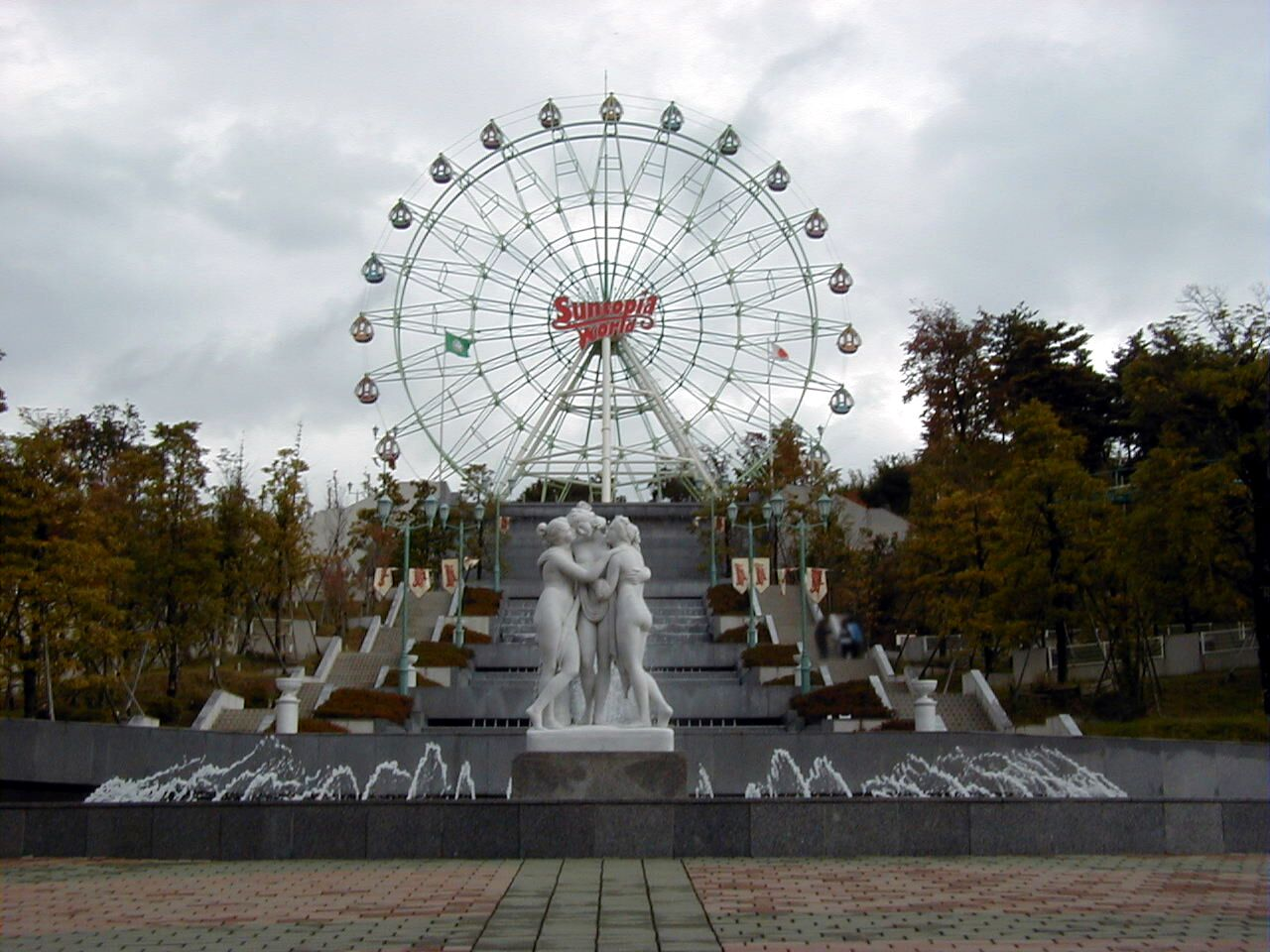 サントピアワールドの大観覧車